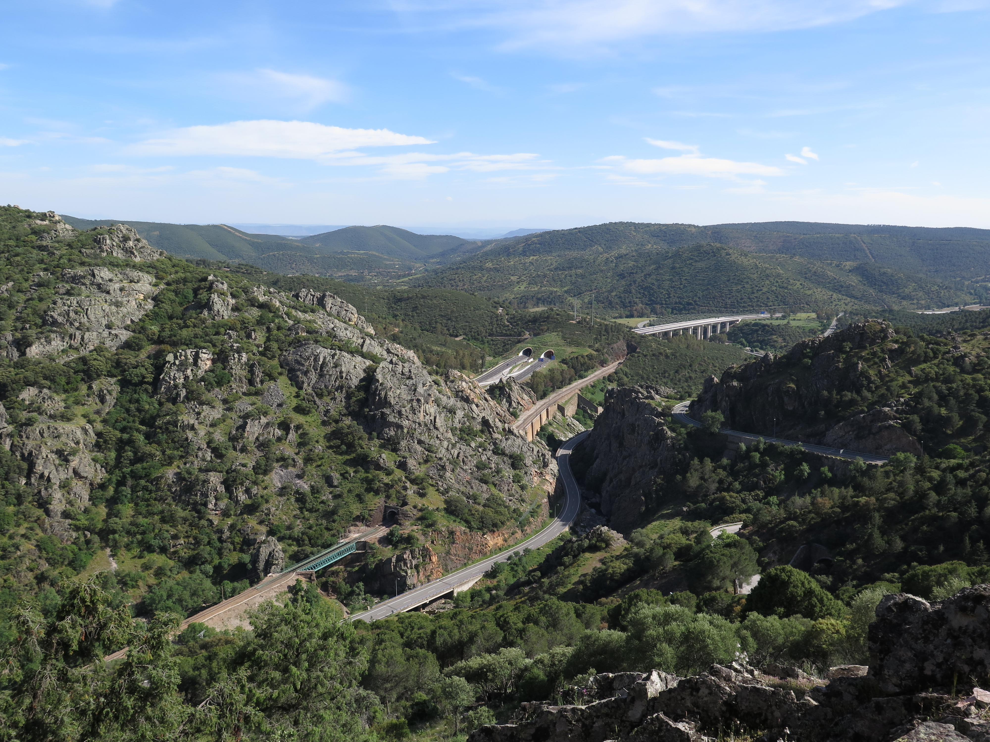 Vista general del parque de Despeñaperros, vista hacia Andalucía.